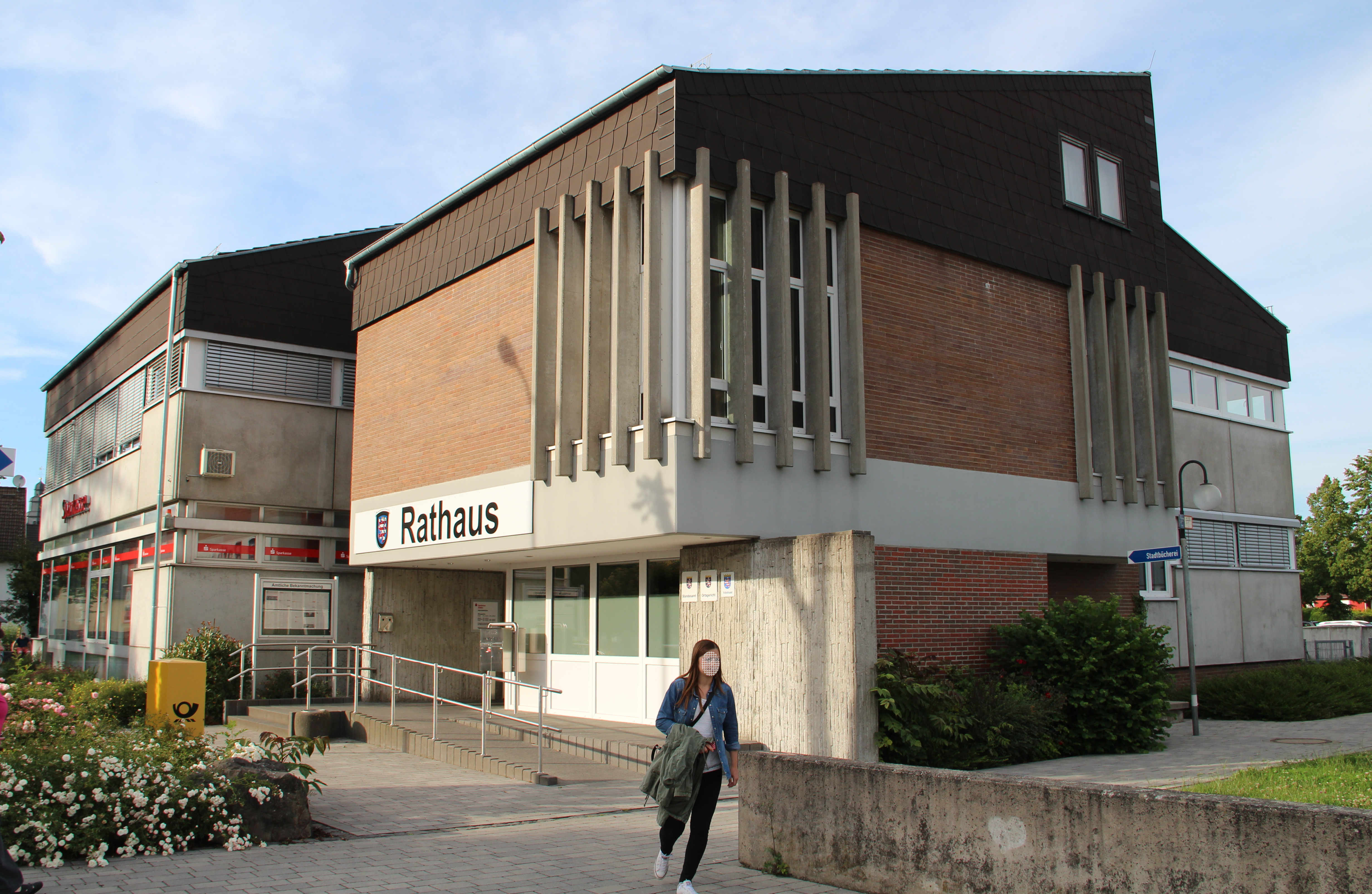 Category:Allendorf (Lumda)